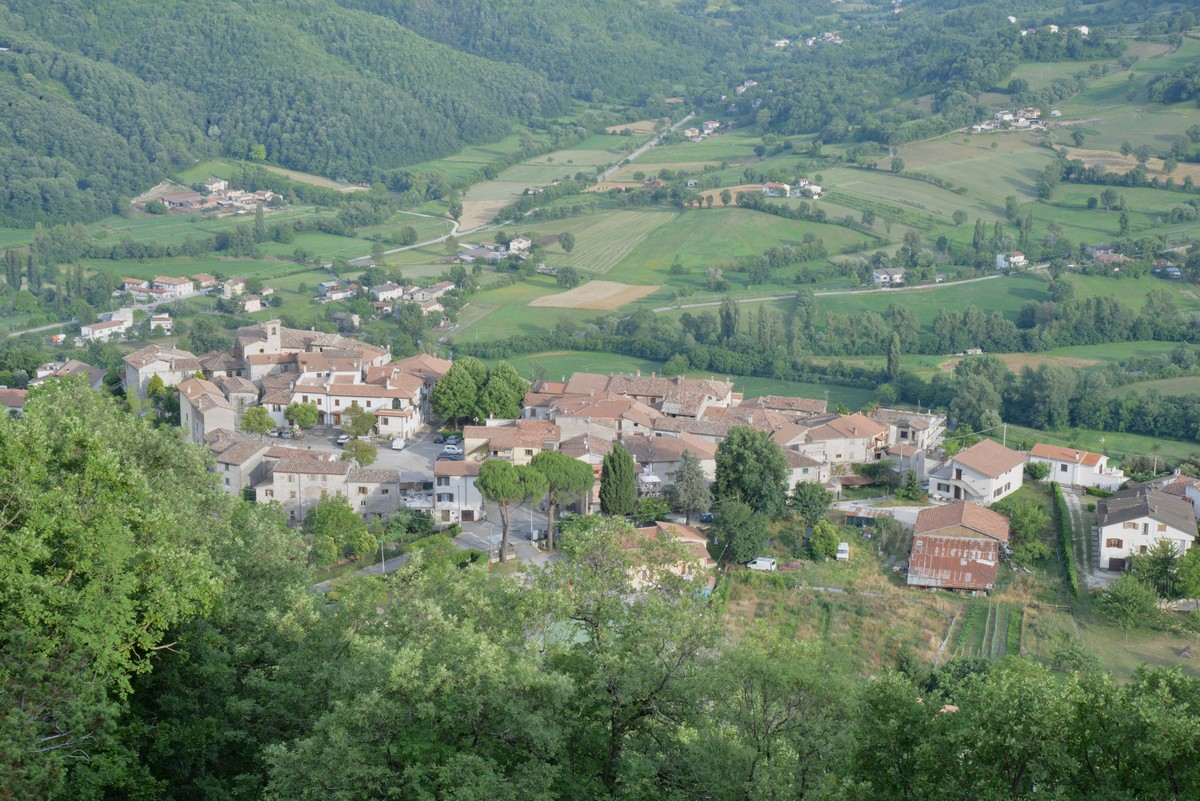 Panorama di S. Filippo RI ripreso da "i scaloni"